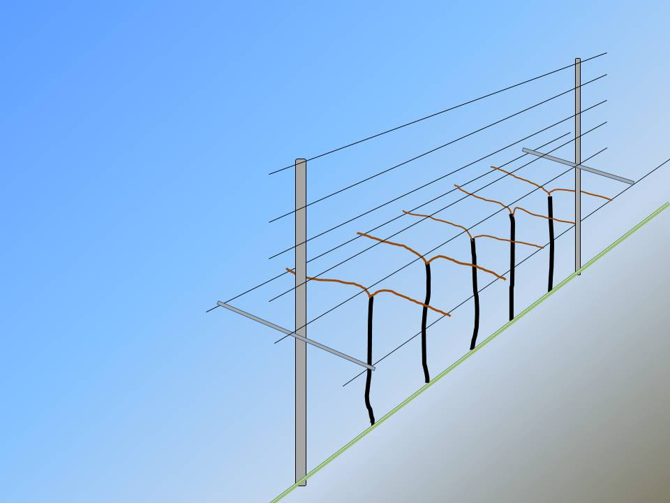 Pergolaerziehung romagnola